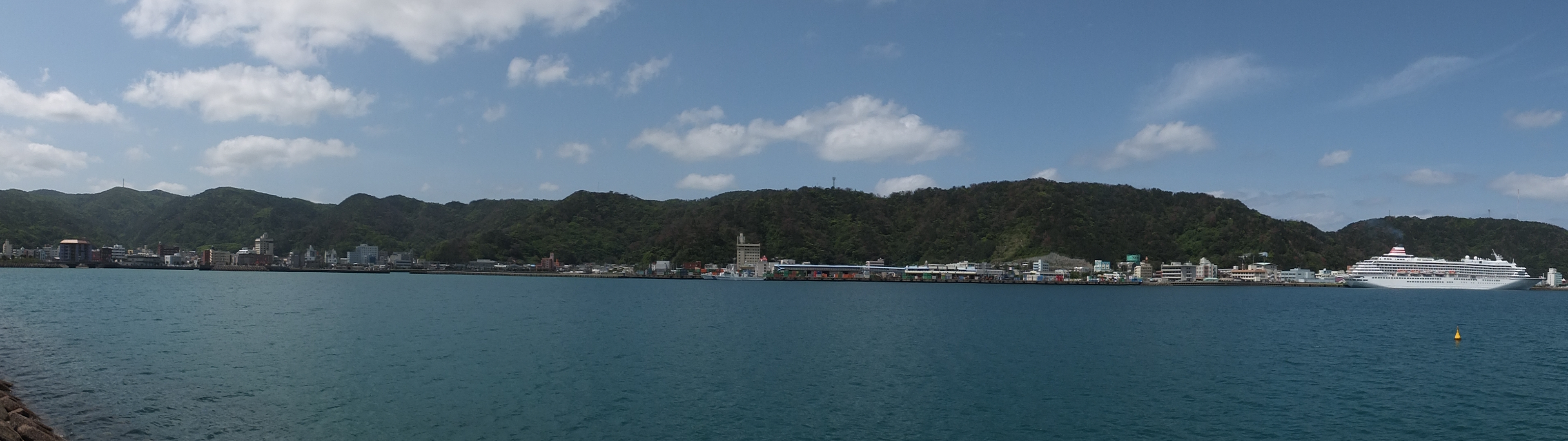 名瀬港 左側から順に本港地区、新港地区、長浜地区。新港地区には貨物が置かれている。